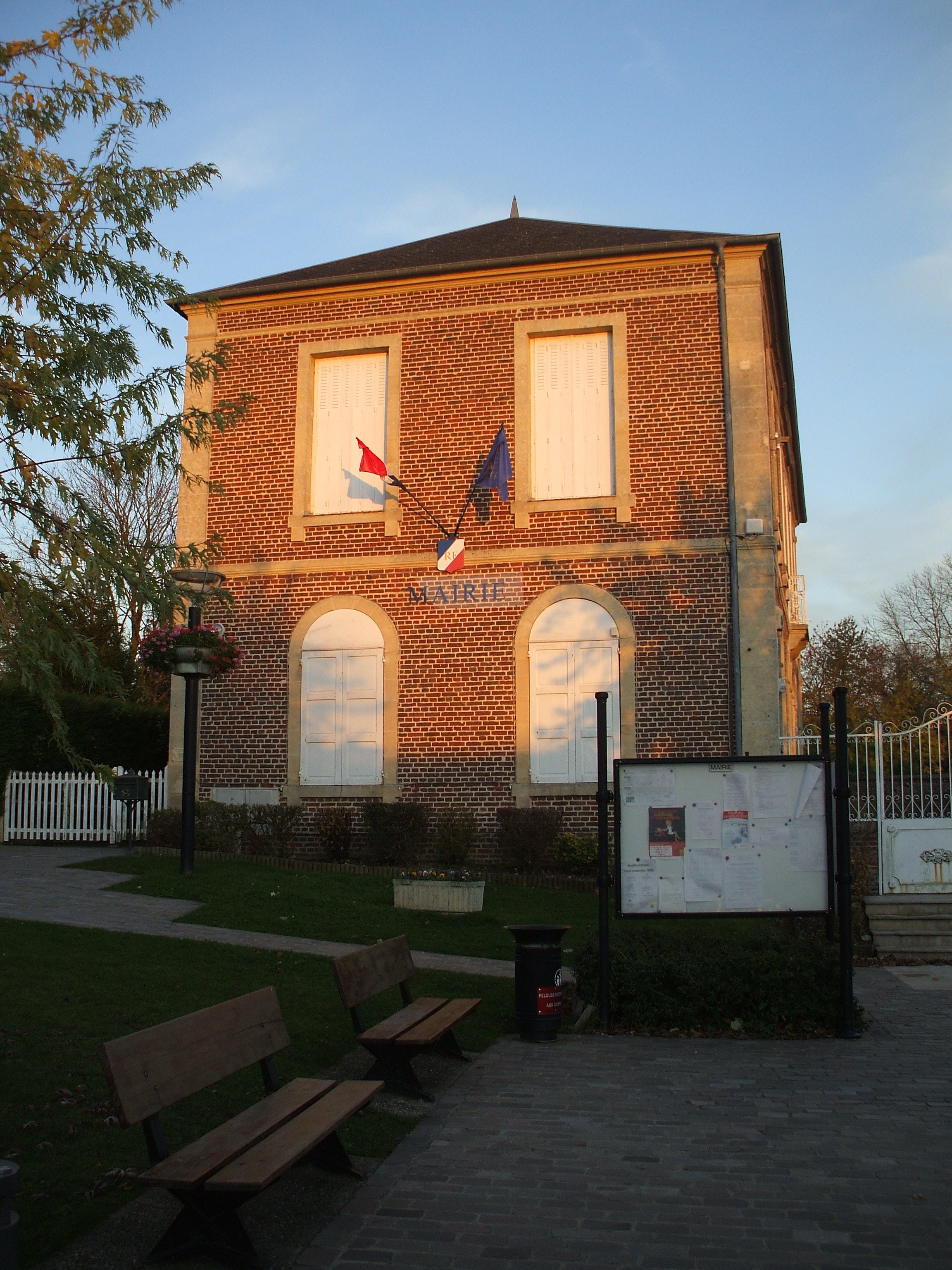 mairie de Laboissière-en-Thelle oise france